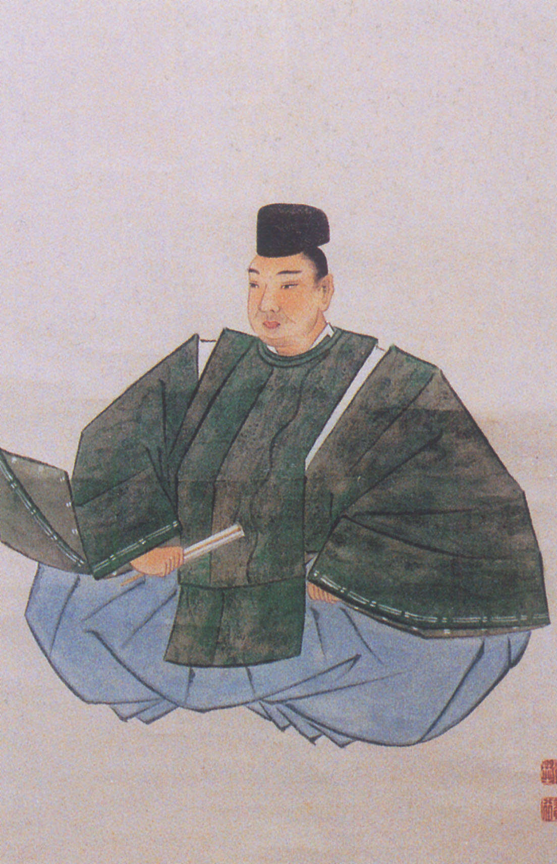 太田黒伴雄 Otaguro Tomoo.